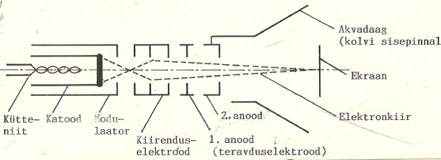 Enda tehtud